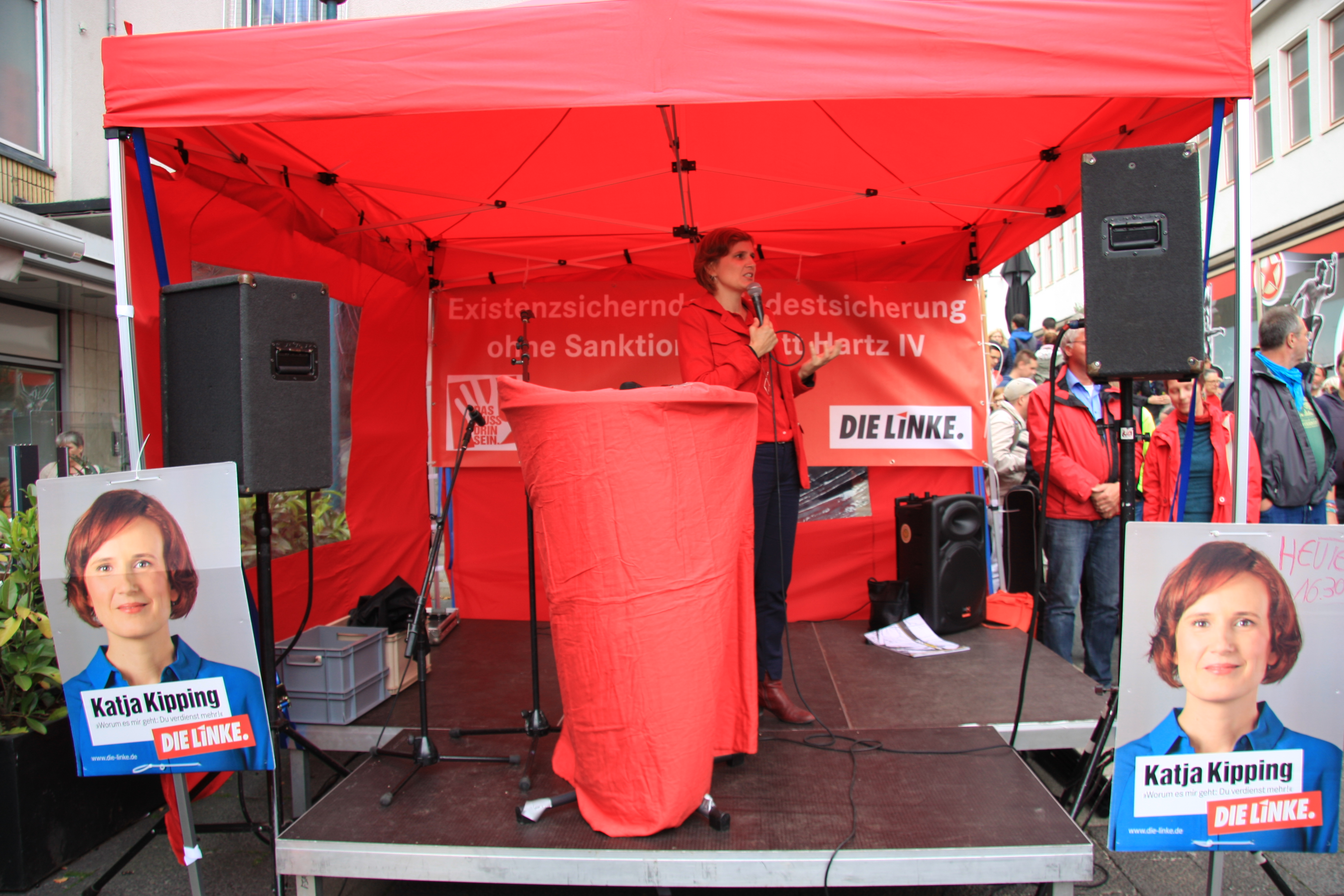 Wahlkampfveranstaltung der Linken mit der Vorsitzenden Katja Kipping am 9. September auf der Treppenstraße in Kassel